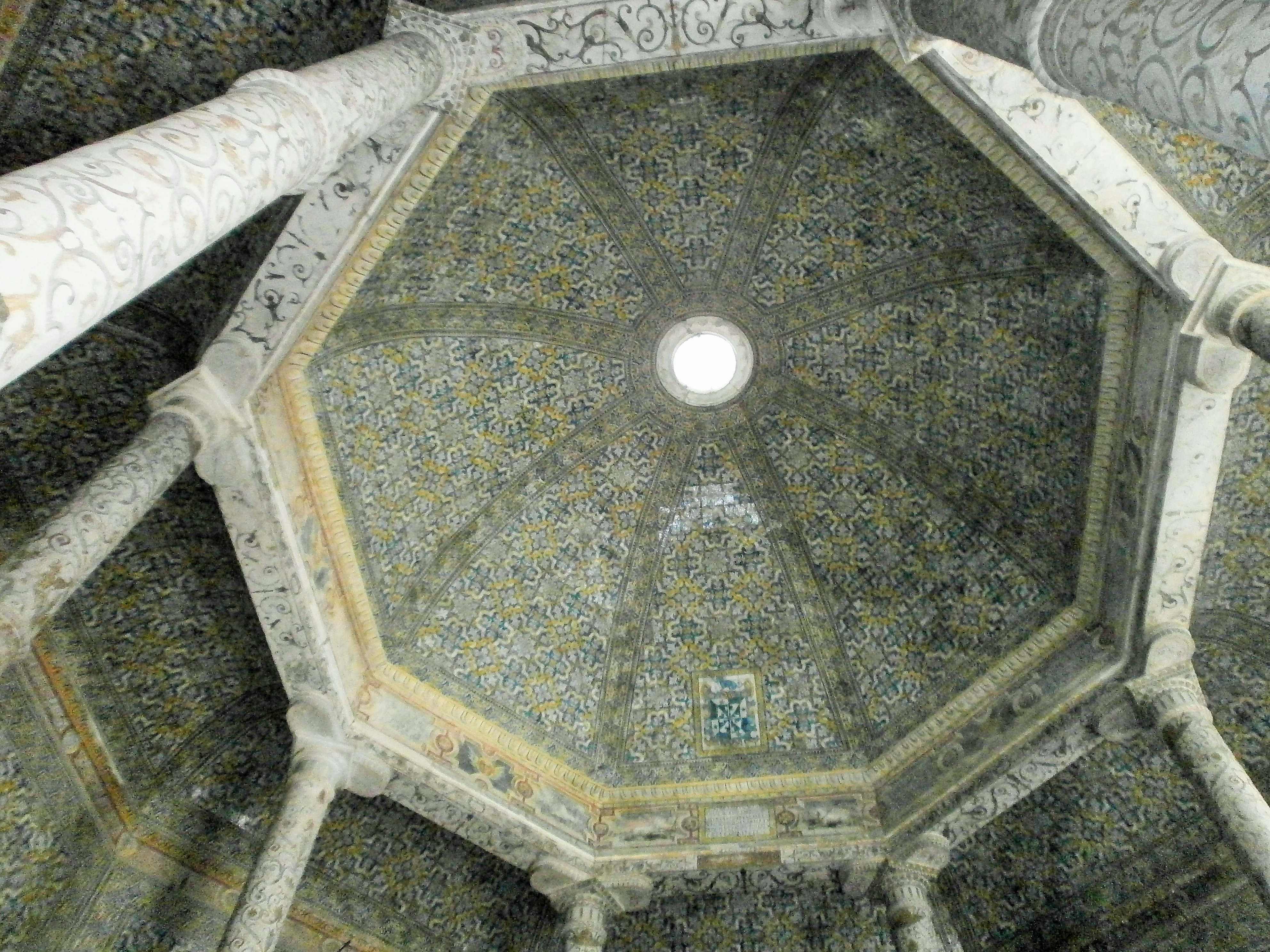 Iglesia de Nuestra Señora de la Asunción. Elvas, Portugal. Bóveda del altar mayor.